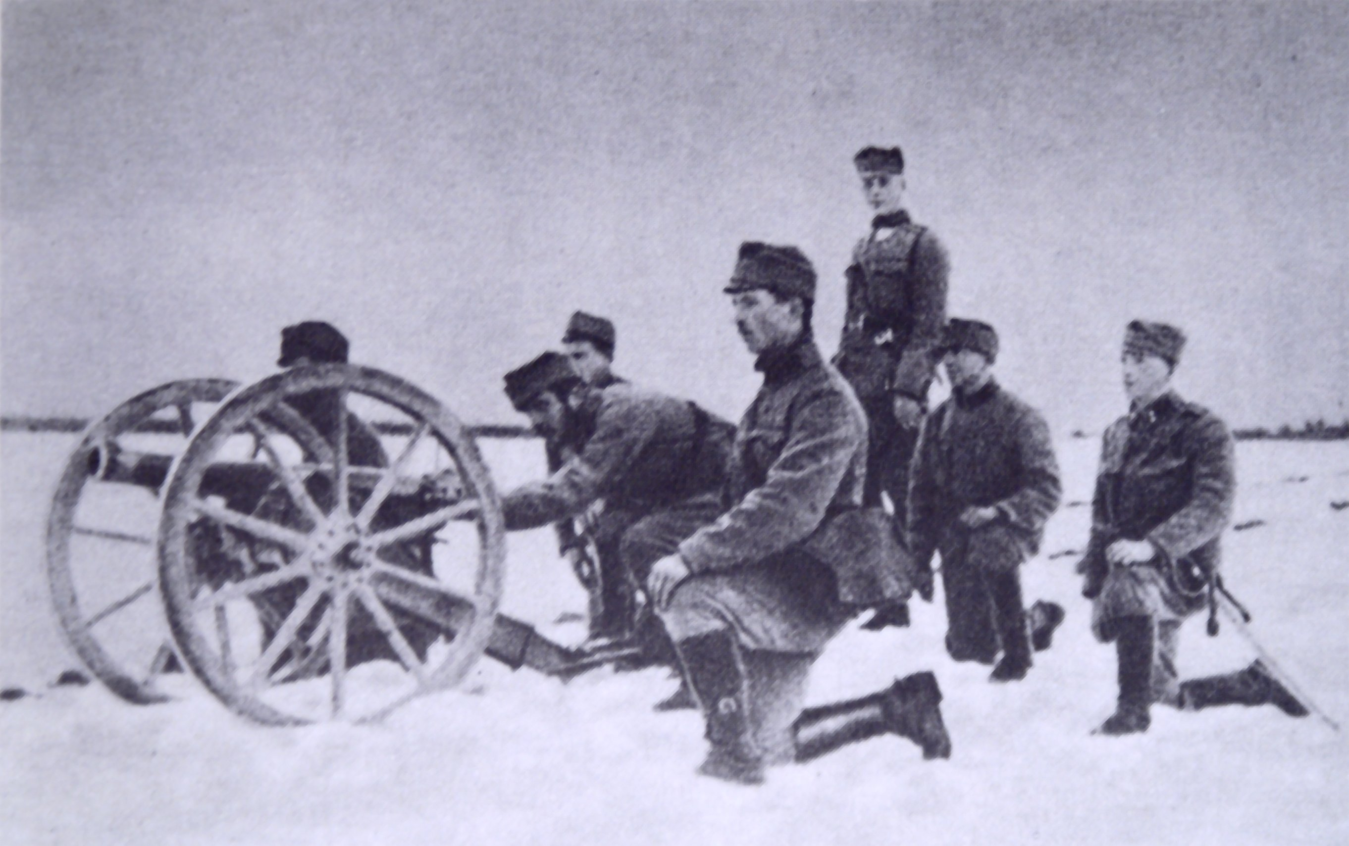 Działo 7 cm M.75 Legionów Polskich. Stoi ogn. Konstler.